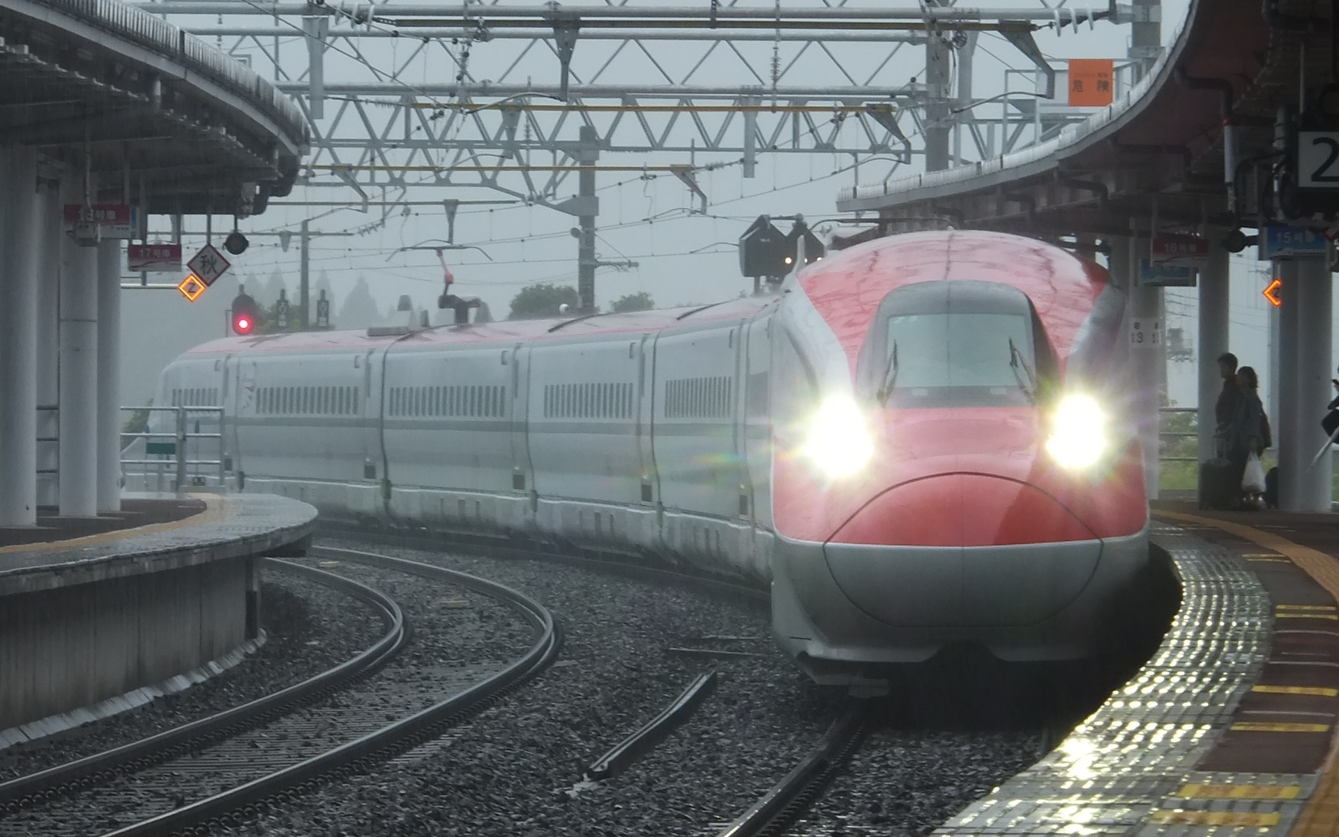 田沢湖駅に入線するこまち26号。